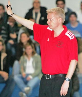 Hockeybundesligaschiedsrichter Michael von Ameln